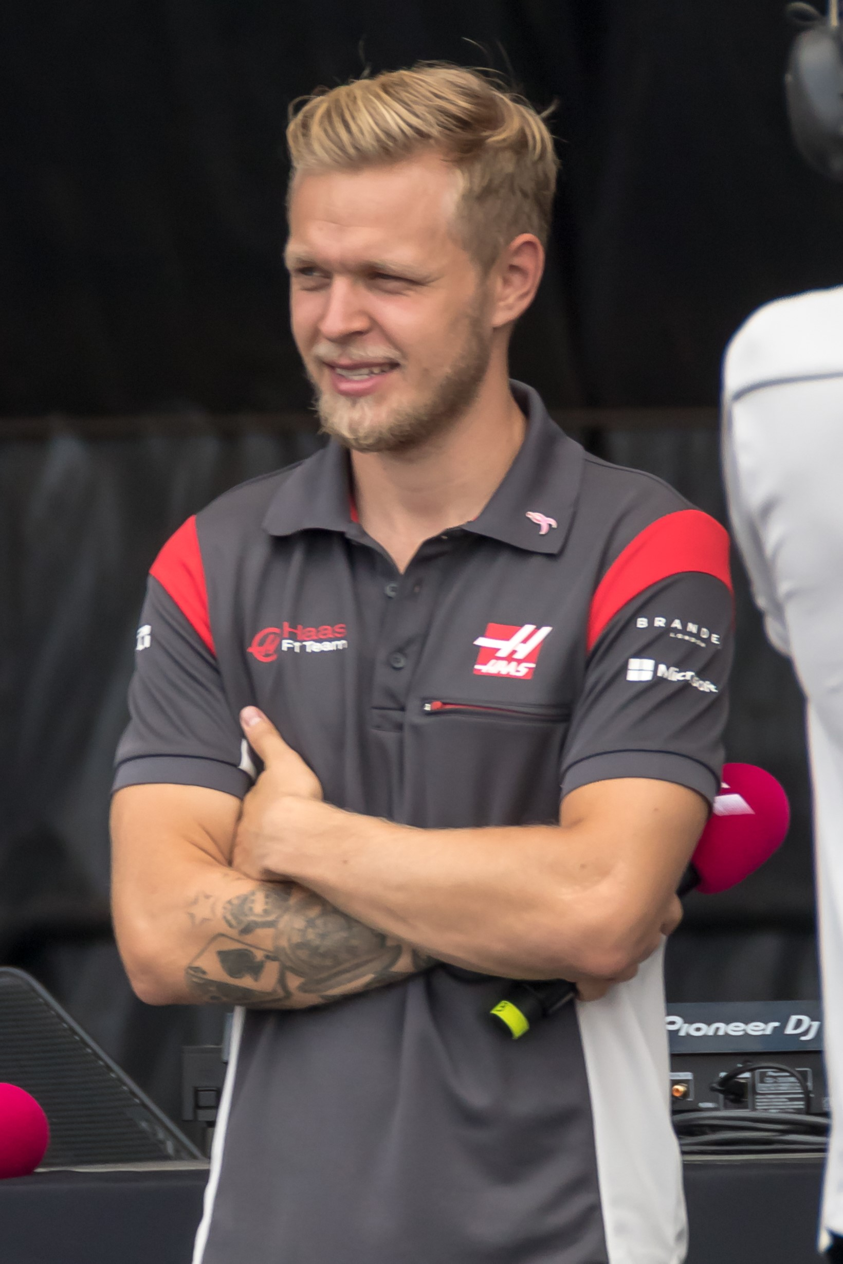 2017 United States Grand Prix Kevin Magnussen.